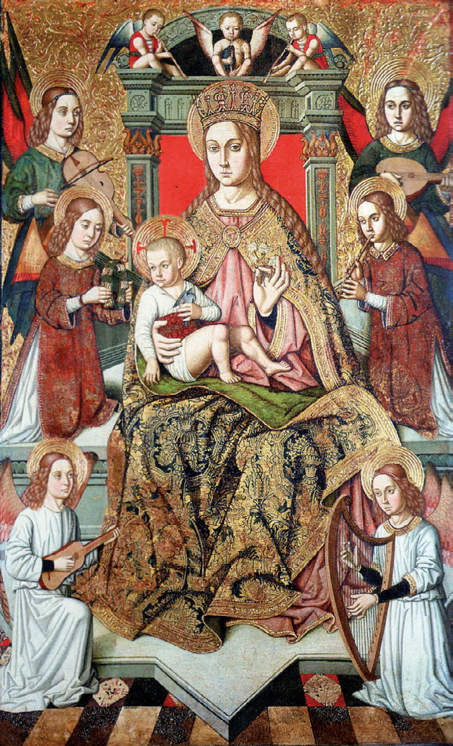 Pala d'altare del Maestro di Castelsardo, opera tardo-cinquecentesca tuttora visibile dietro l'altare della cattedrale di S. Antonio Abate a Castelsardo